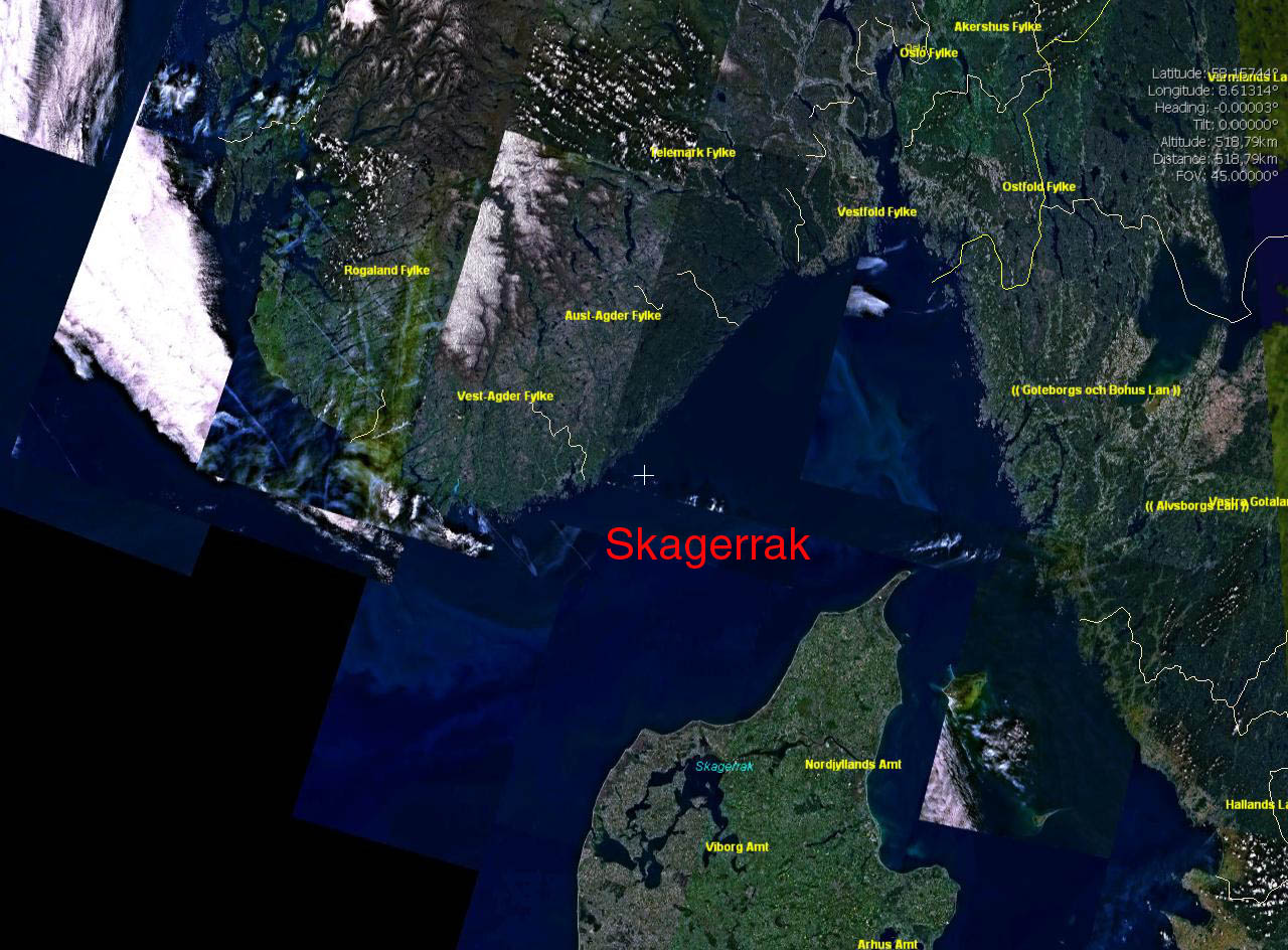 Skagerrak fra NASA - WorldWind - ingen rettigheter beholdt hos NASA.